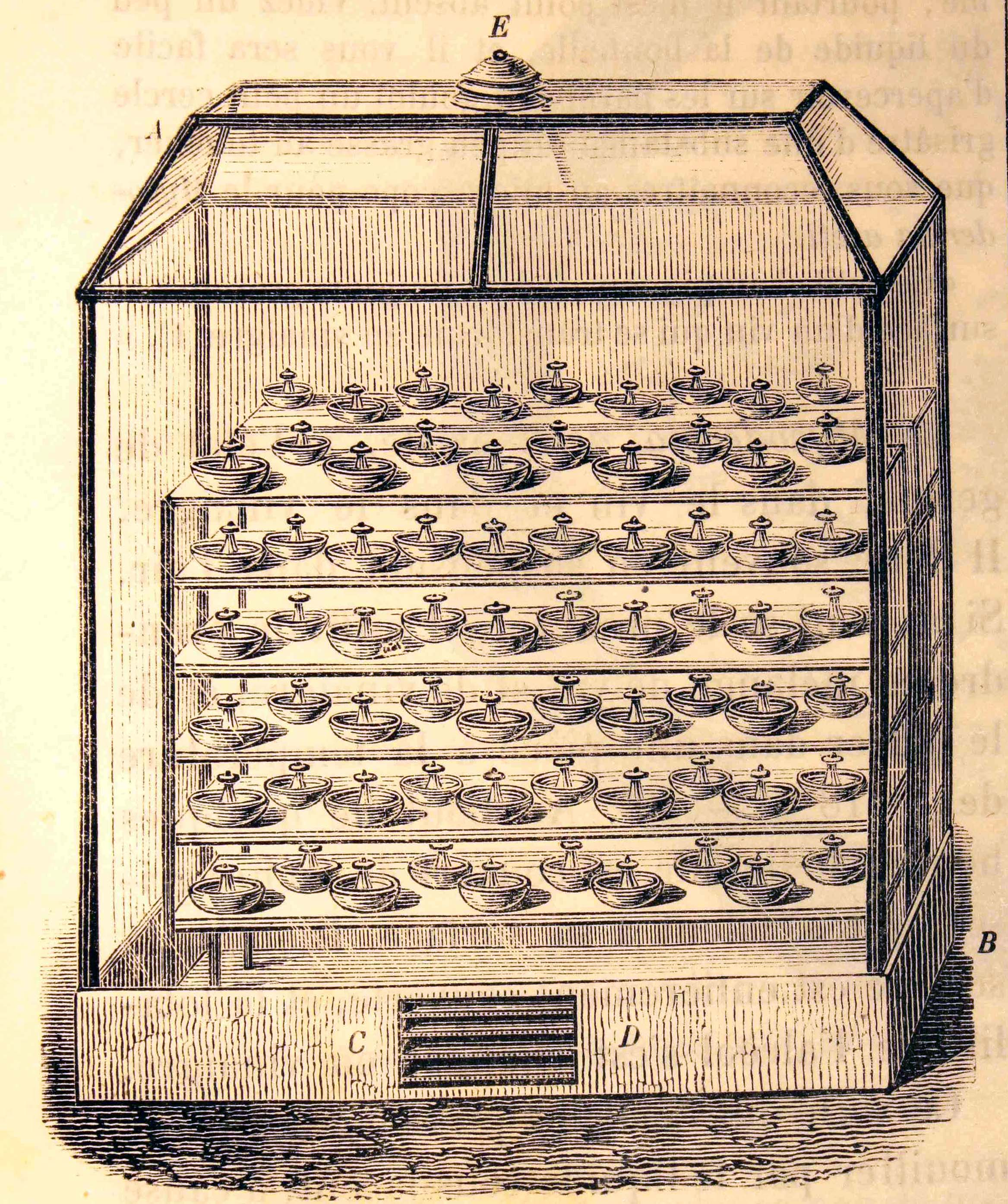 Ilustraciones de la obra : Les merveilles de l'industrie ou, Description des principales industries modernes / par Louis Figuier. - Paris : Furne, Jouvet, [1873-1877]